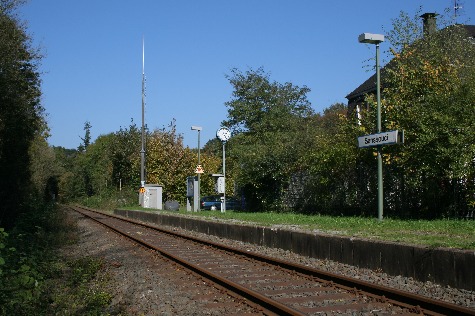 Haltepunkt Sanssouci der Hönnetalbahn in Balve.